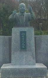 山口常光像 壱岐市勝本町鯨伏地区